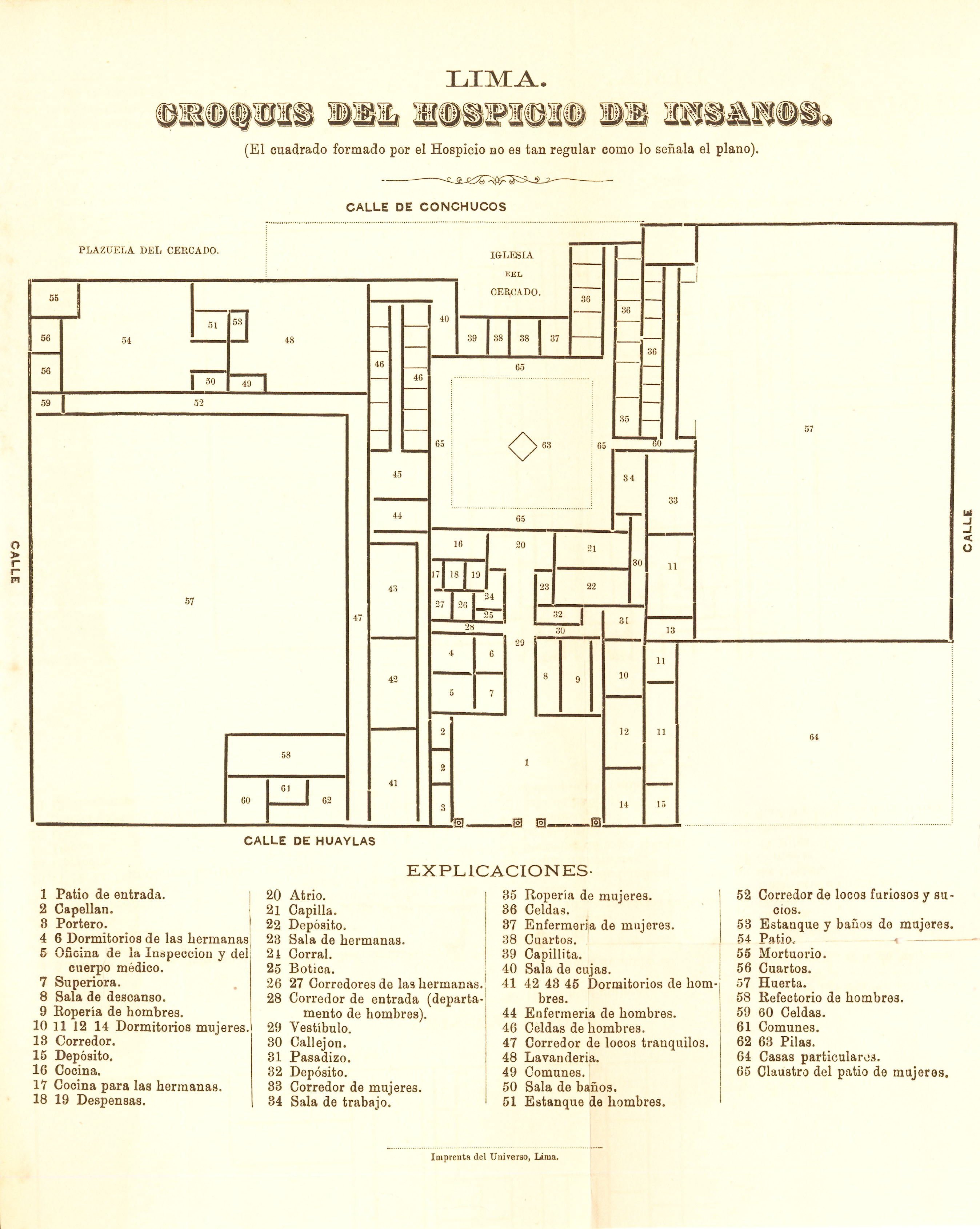 Croquis del Hospicio de Insanos de Lima, 1885